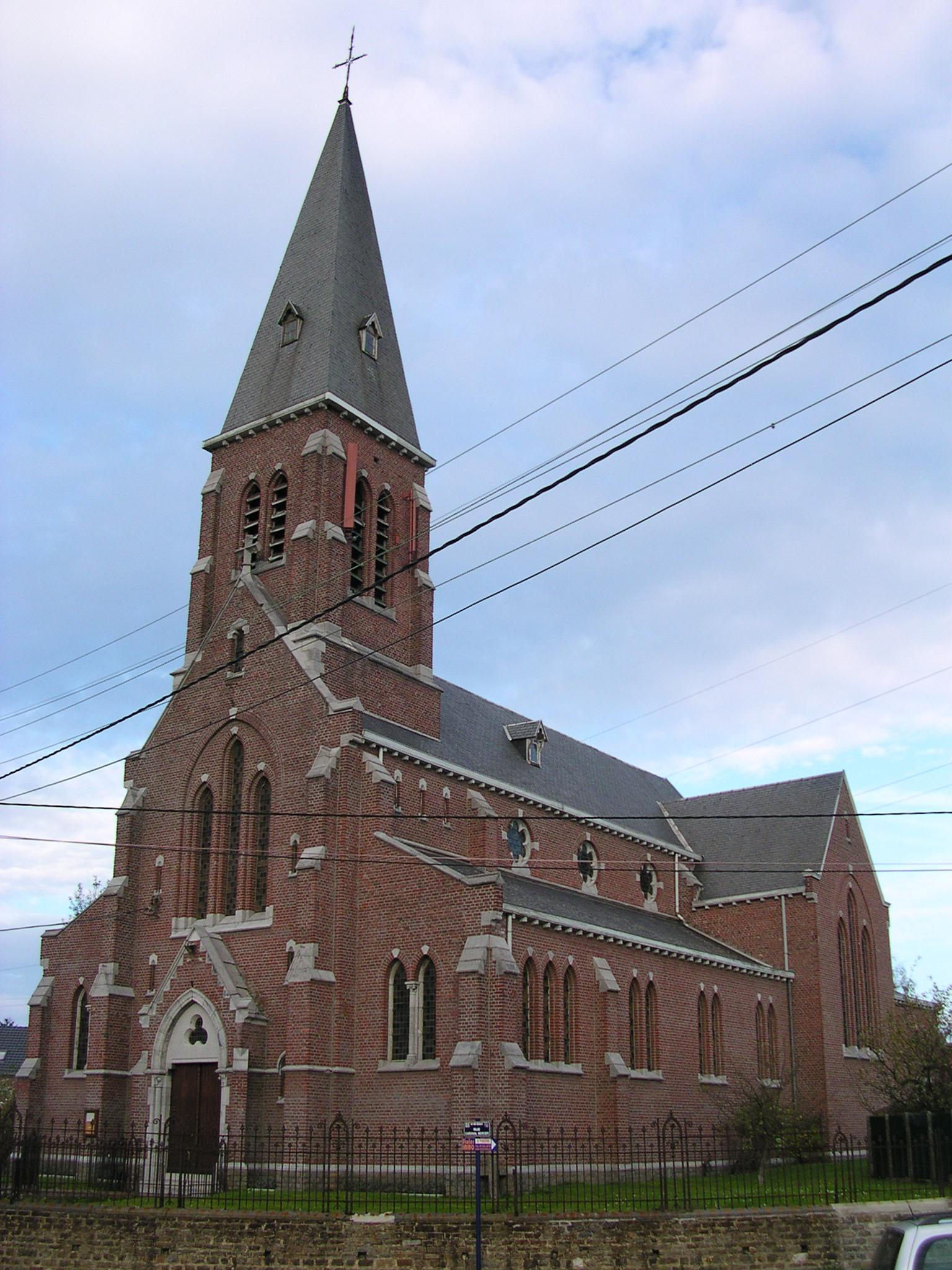 Beyne-Heusay, Kirche 1 (Ich habe 2 Kirchen in Beyne-Heusay gefunden, weiß aber nicht wie sie heißen. Diese war auf der Romsée-Seite der Durchgangsstraße - bitte editiert die Beschreibung)